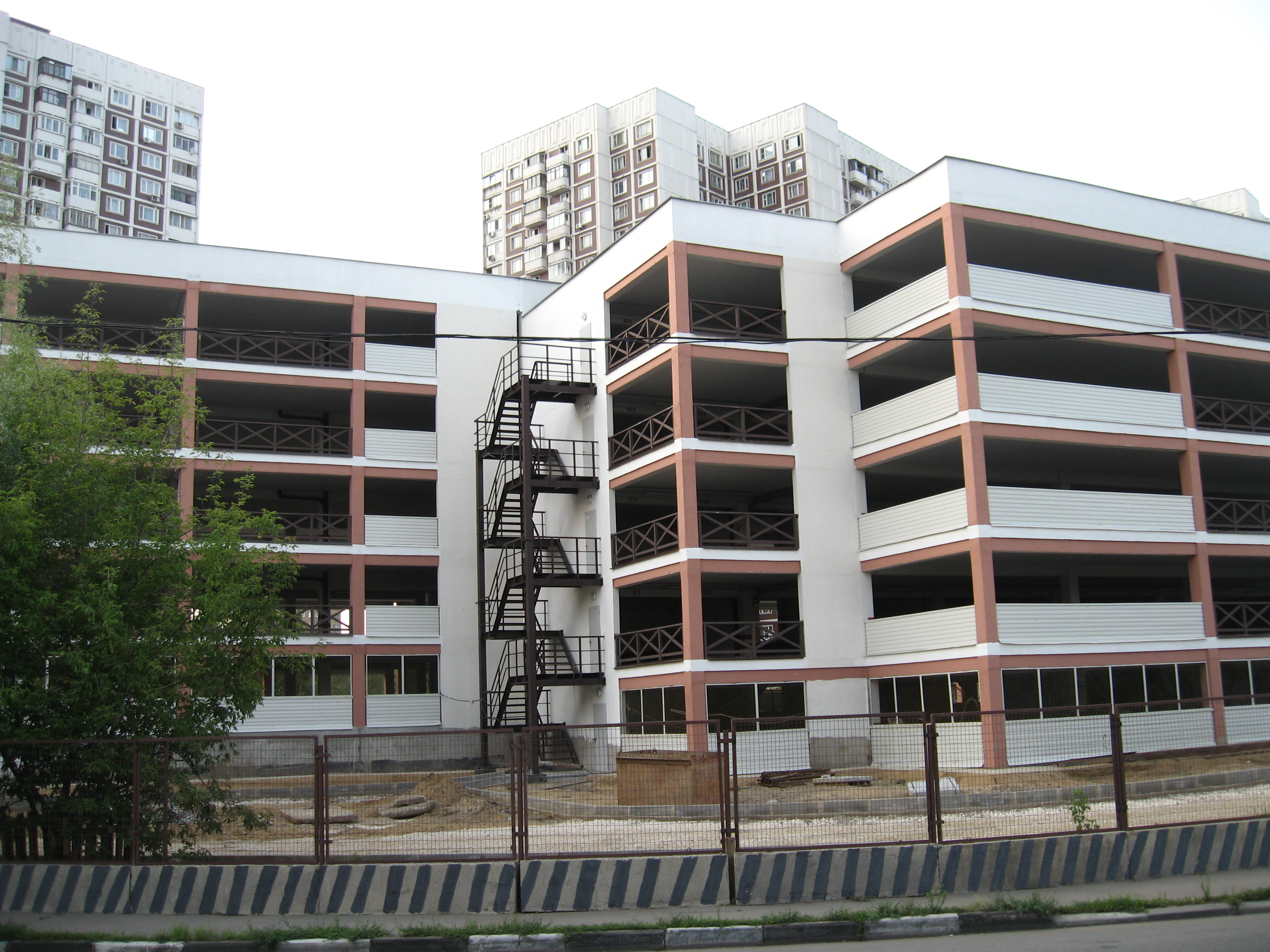 недостроенный «Народный гараж» во Втором Южнопортовом проезде